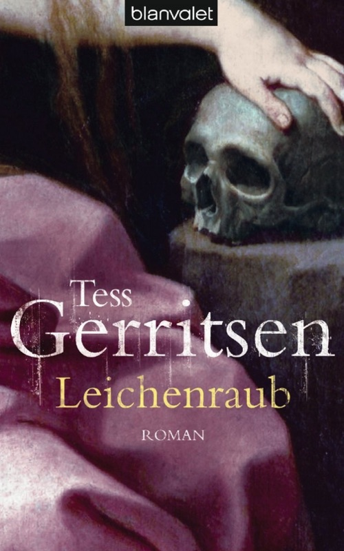 Tess Gerritsen: Leichenraub. Blanvalet, München 2010. DNB